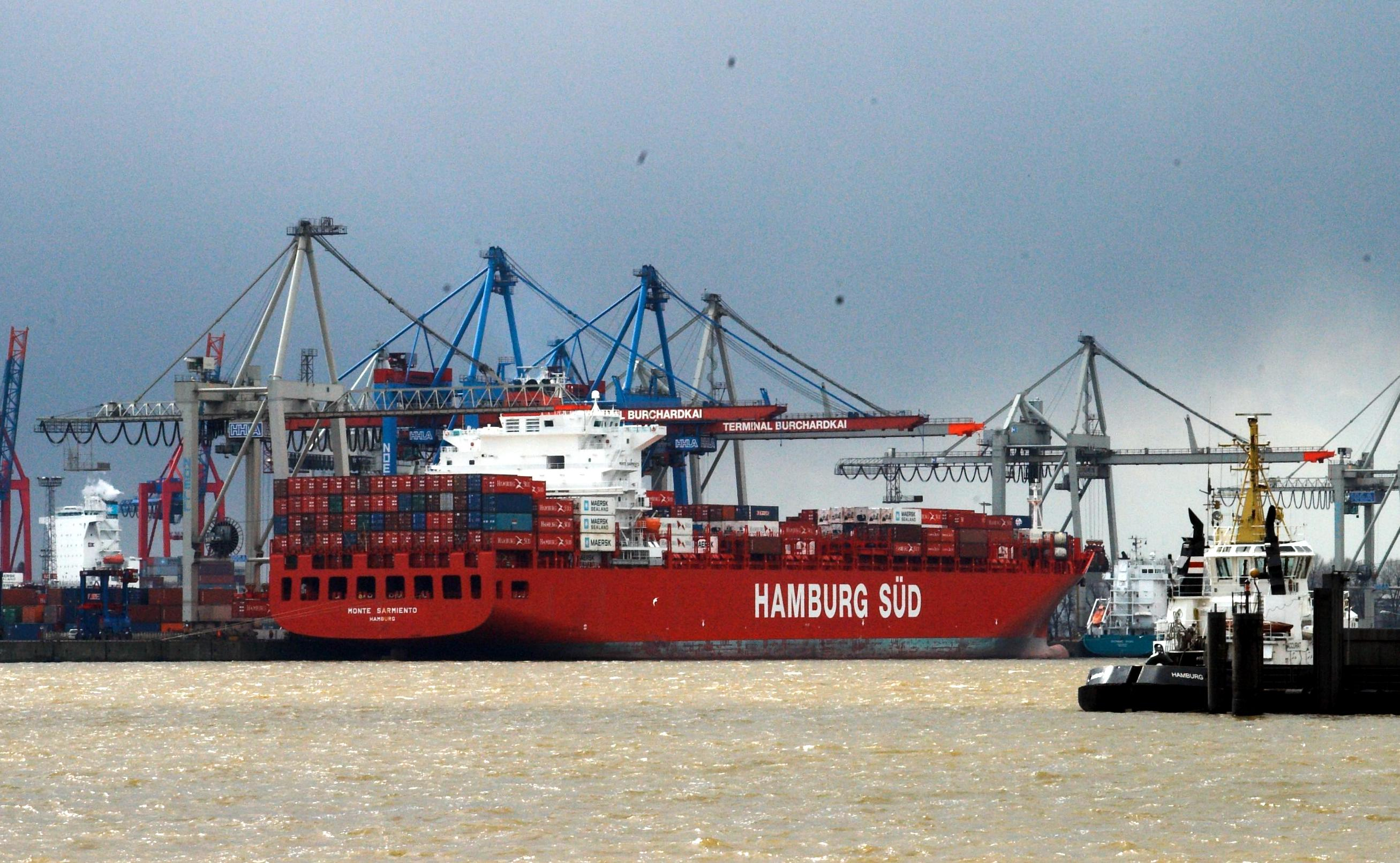 Das Containerschiff Monte Sarmiento der Reederei Hamburg Süd am Container Terminal Burchardkai, Hamburg. IMO Number: 9283227 MMSI Number: 211738000 Callsign: DCLH2 Length: 272 m Beam: 40 mHamburg Süd